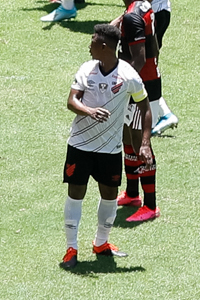 (Brasília - DF, 16/02/2020) Jogo Flamengo x Atlético PR. Foto: Carolina Antunes/PR